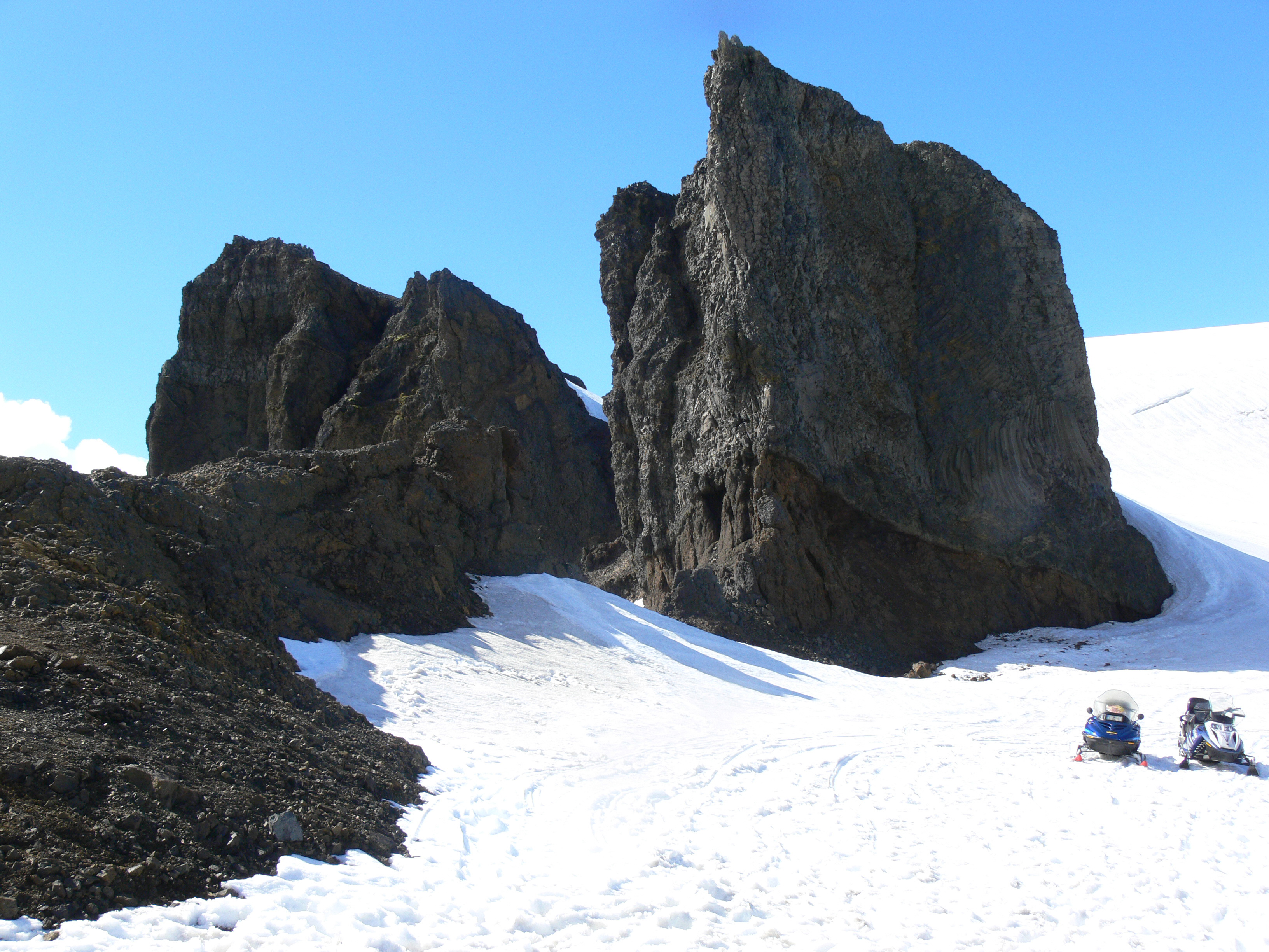 Bimudalstindur auf dem Skálafellsjökull, einer Gletscherzunge des Vatnajökull.